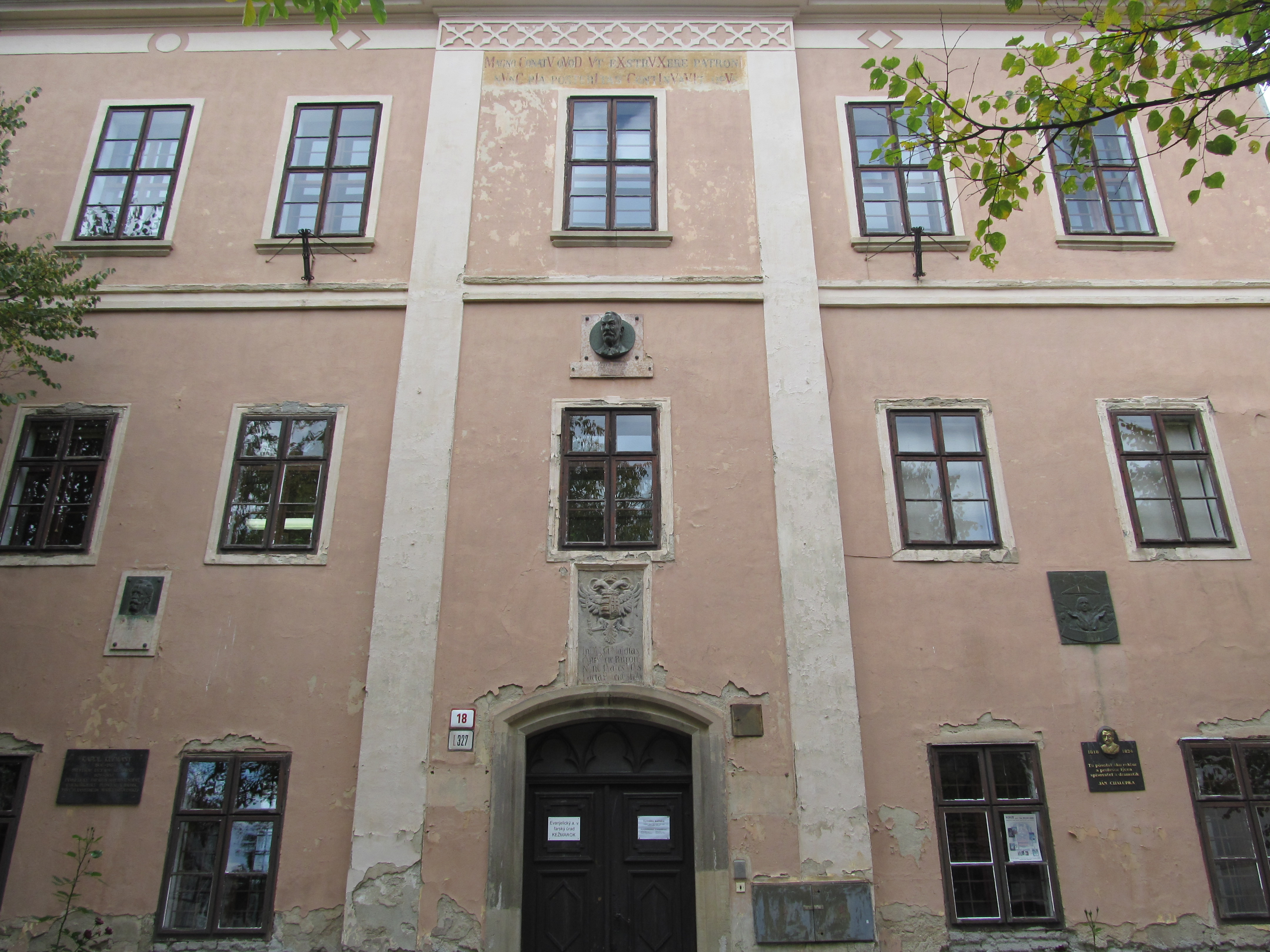 Lýceum pamätné